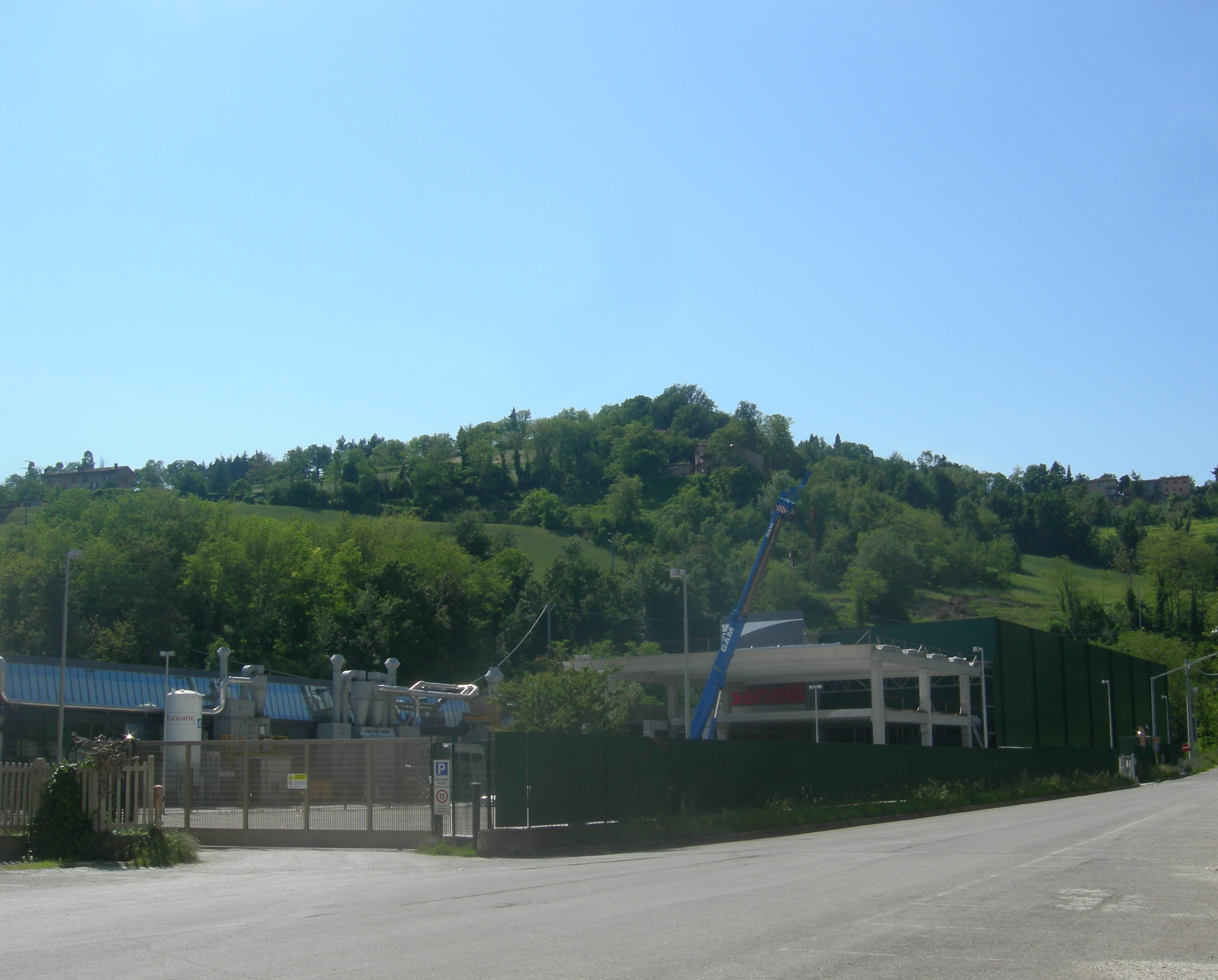 Lo stabilimento industriale della Benelli Armi in Urbino.